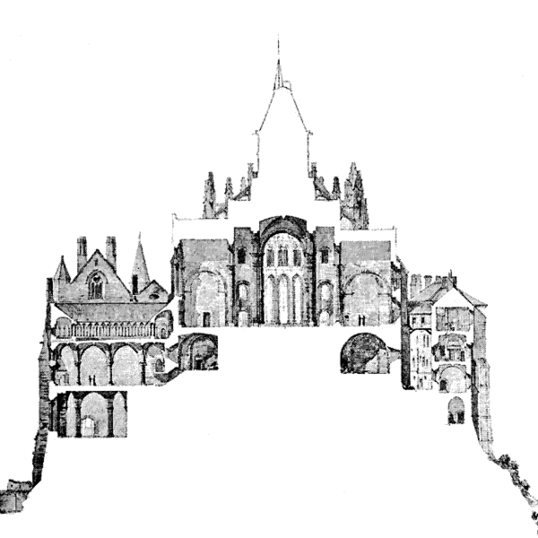 Reproduction du dessin de M. Éd. Corroyer appartenant aux archives de la Commission des Monuments historiques. On notera que la chapelle de Notre-Dame-Sous-Terre ne figure pas dans cette coupe. Provient de l'édition anastaltique de "Le Mont Saint-Michel"(1910) de Paul Gout (1852-1923).